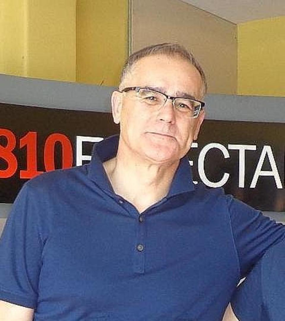 Emiliano Cotelo en las oficinas de CX14 Radio El Espectador 810kHz AM Montevideo Uruguay 31 de diciembre de 2014